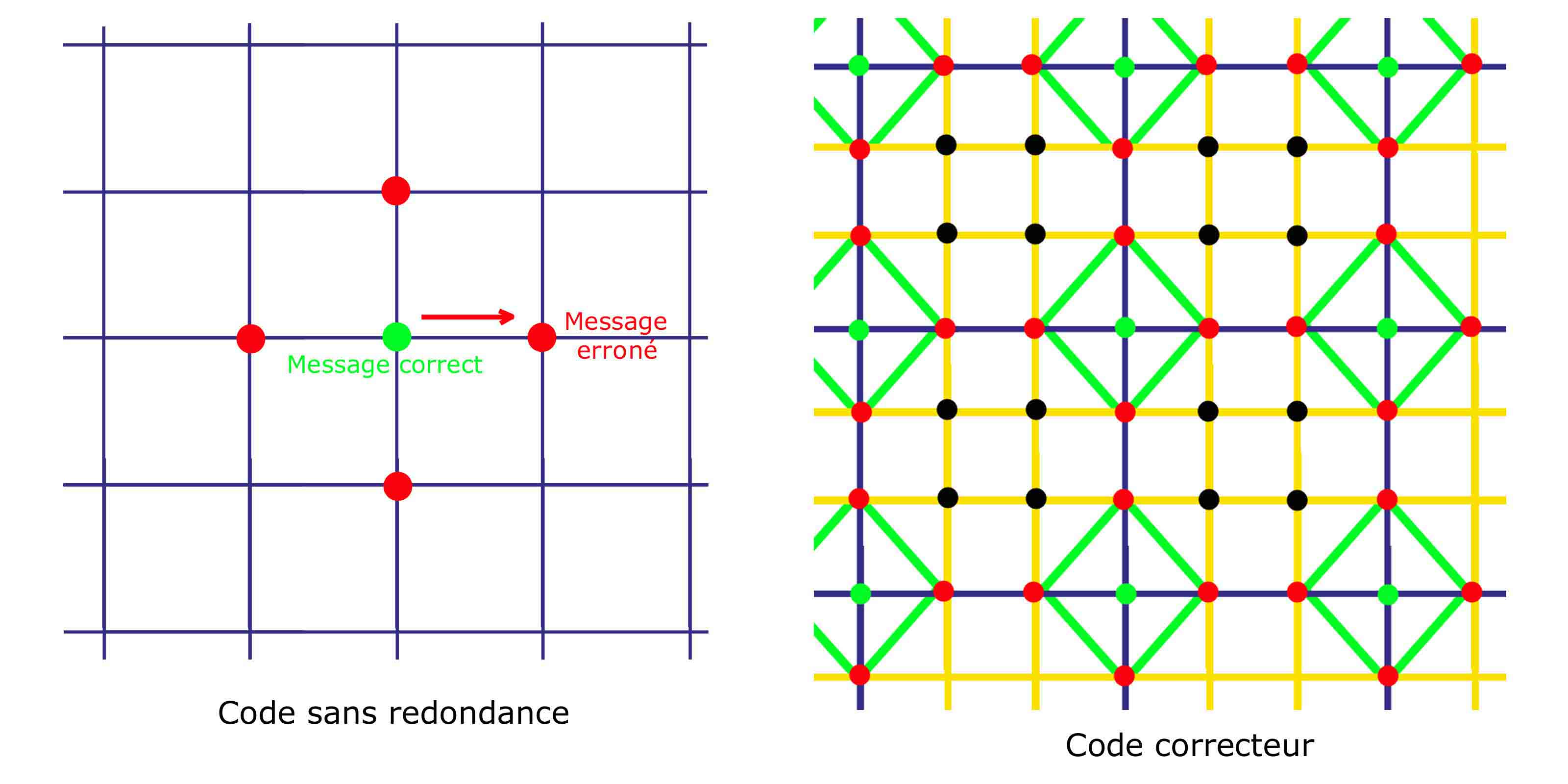 Figure illustrant le principe de la redondance dans un code correcteur